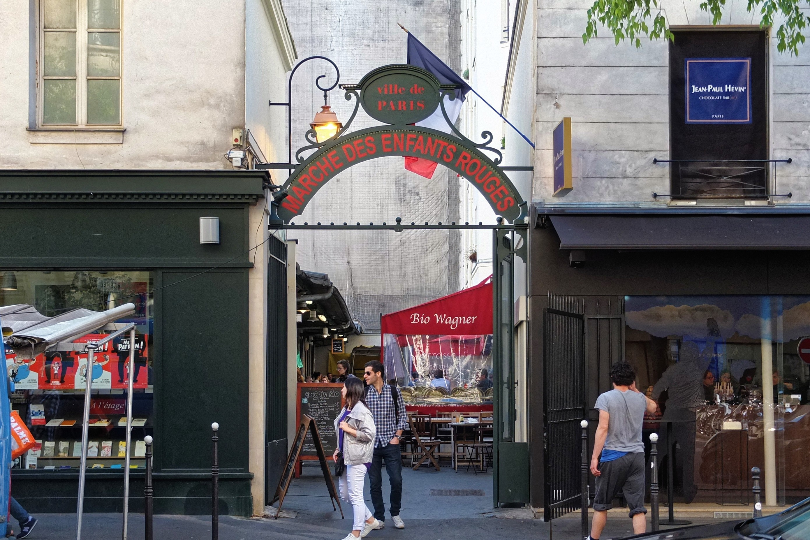 Le marché